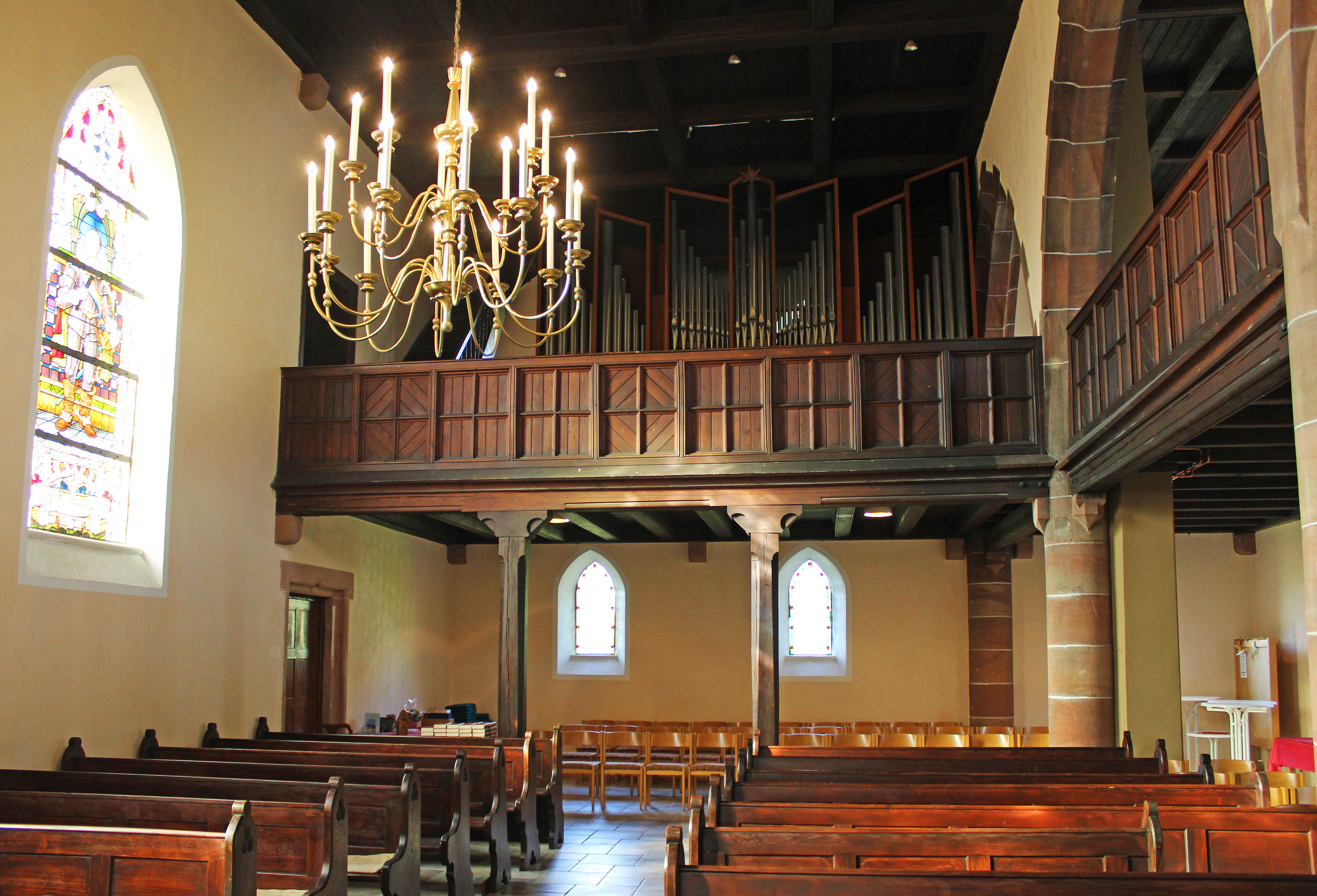 Blick ins Innere der evangelischen Jakobuskirche in Niederbexbach, einem Stadtteil von Bexbach, Saarpfalz-Kreis, Saarland